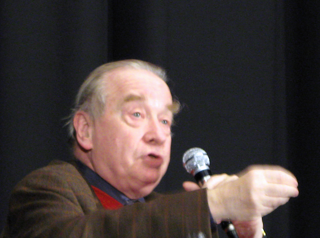 Michel Ciment, à Amiens (France) - Lors de la table ronde "autour de l'oeuvre de Karel Reisz", avec Betsy Blair et Gilles Laprévotte (à la "Maison de la Culture") lors du « 27ème Festival international du film d'Amiens ».